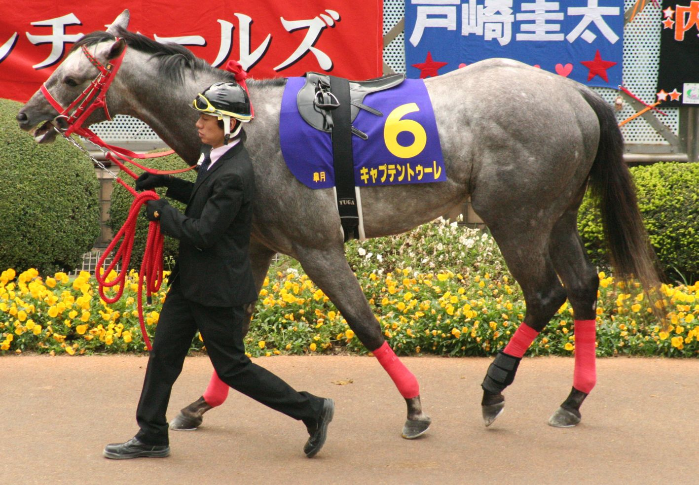 キャプテントゥーレ（中山競馬場 第68回皐月賞）